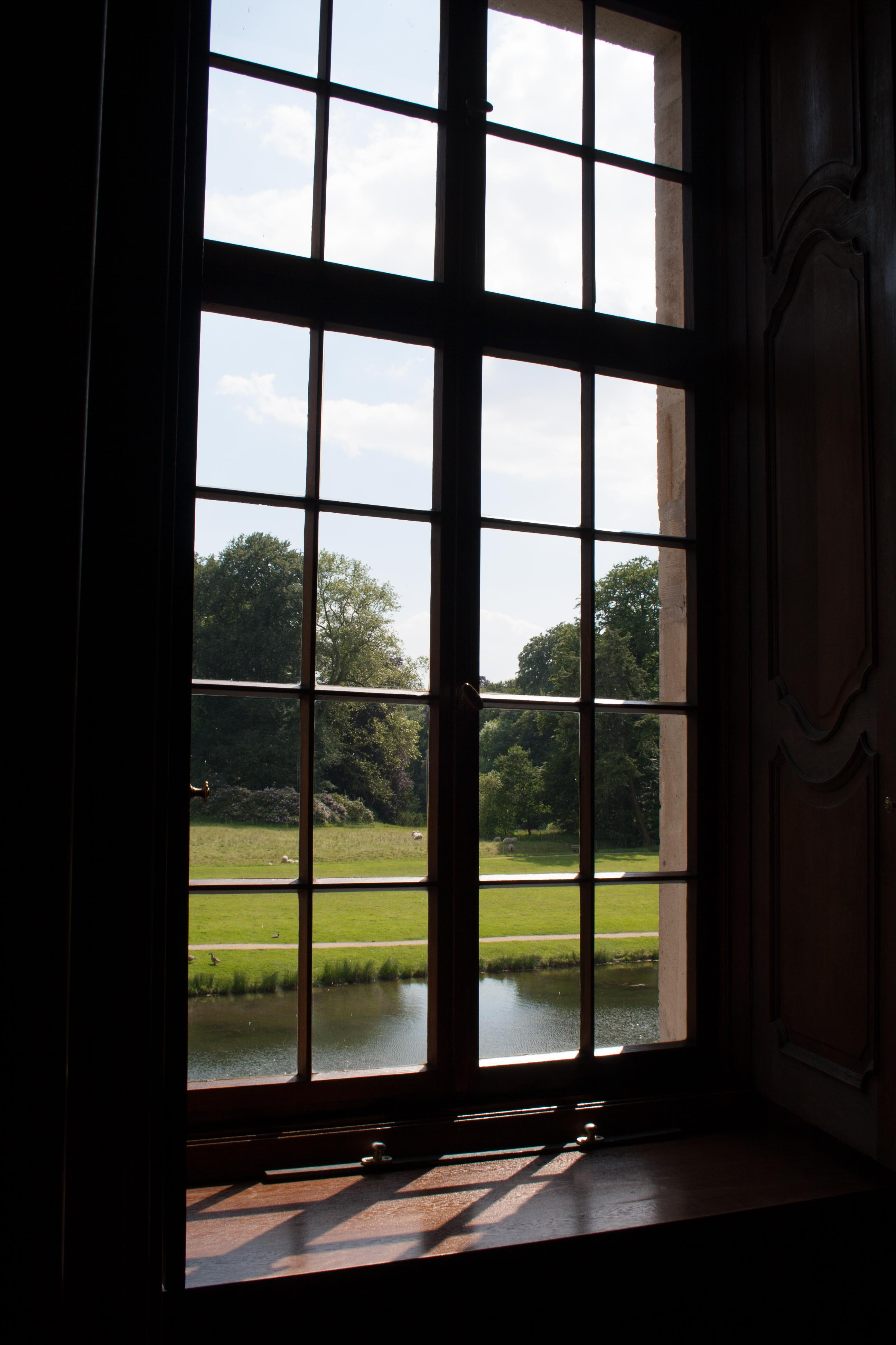 Fenster, Schloss Dyck